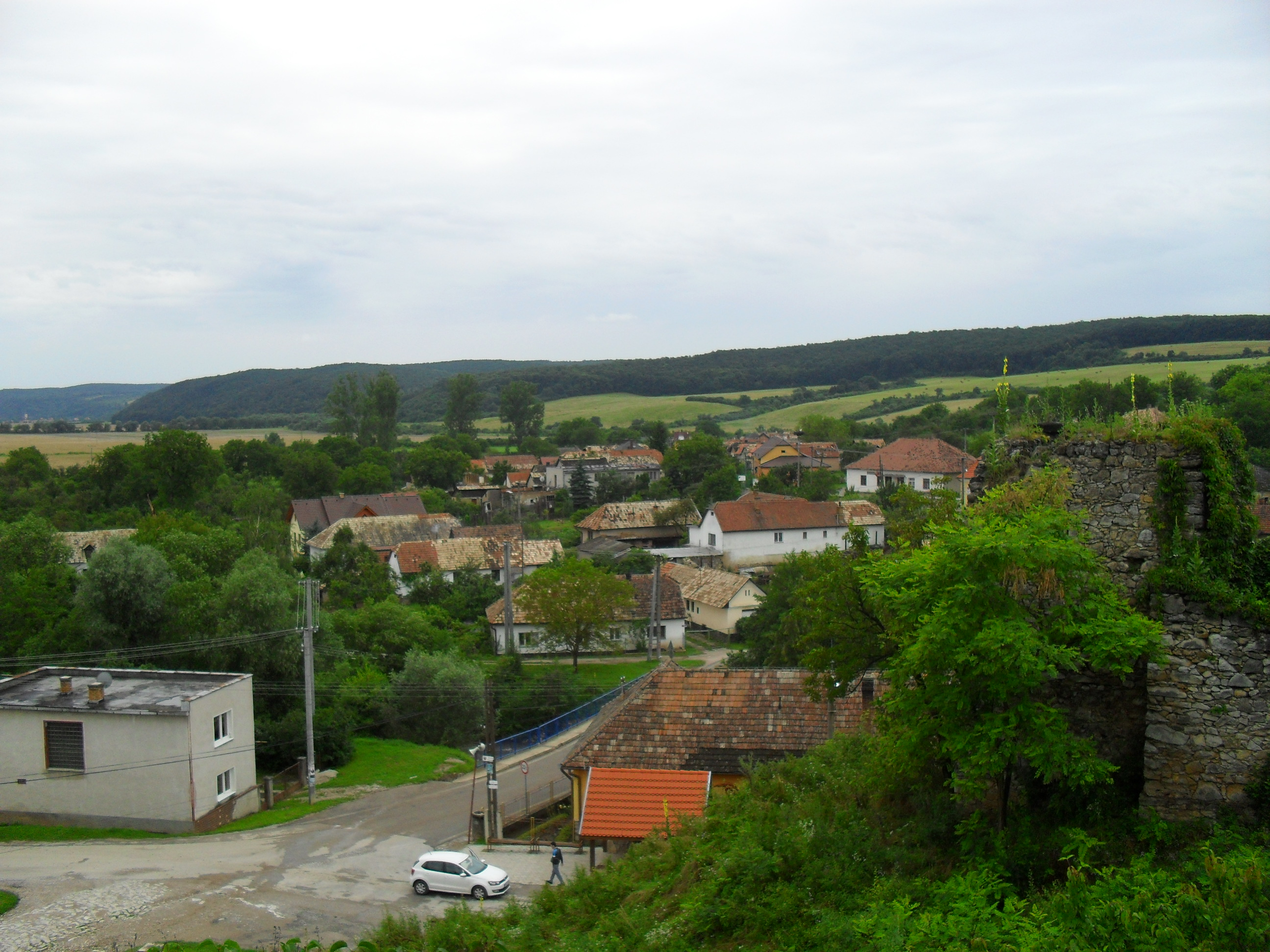 Beretke - látkép